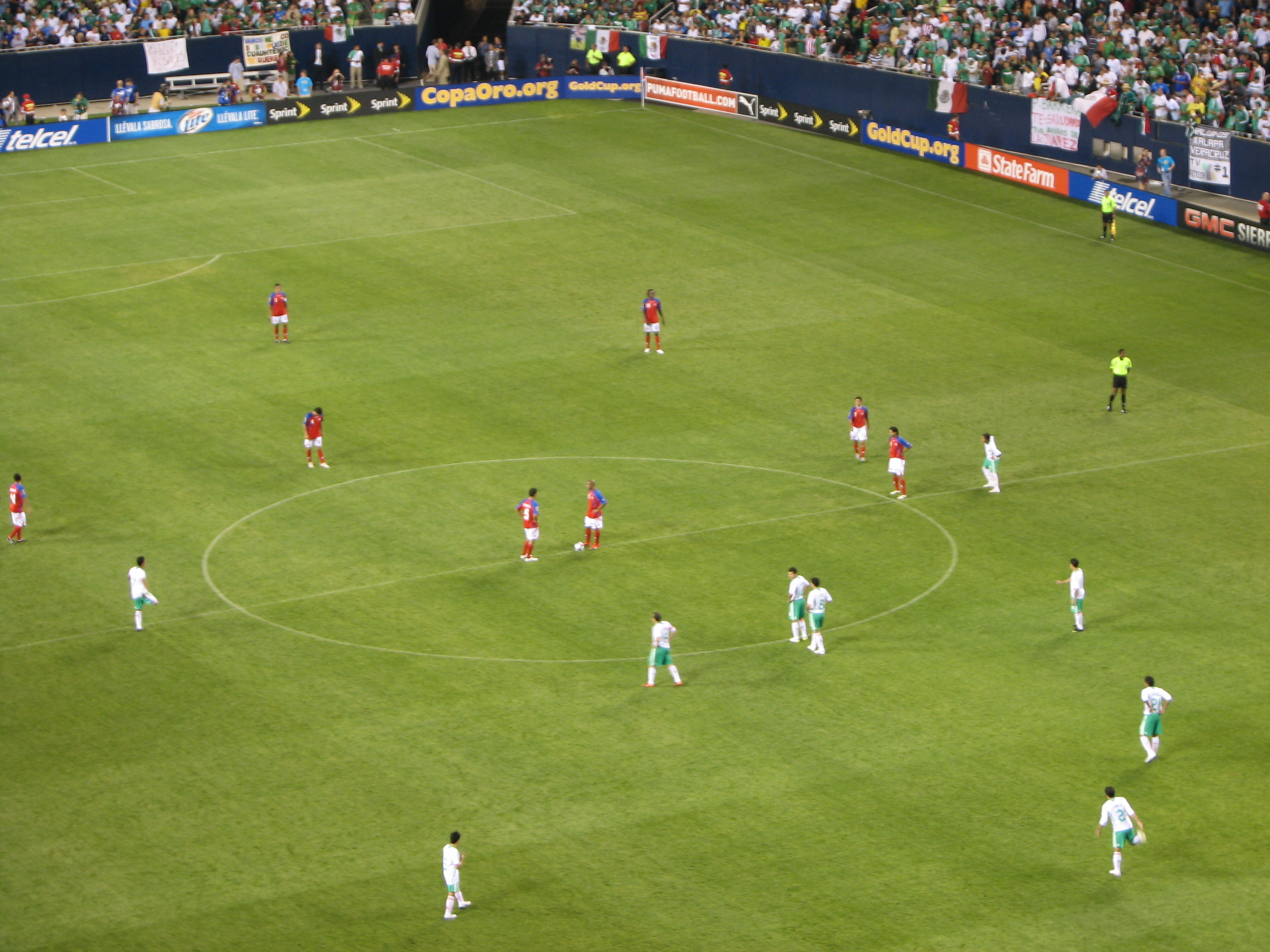 Mexico contra Estados Unidos al inicio del partido de semifinales